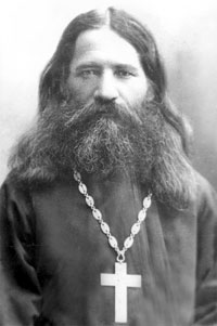 Авксентий Юртов в рясе